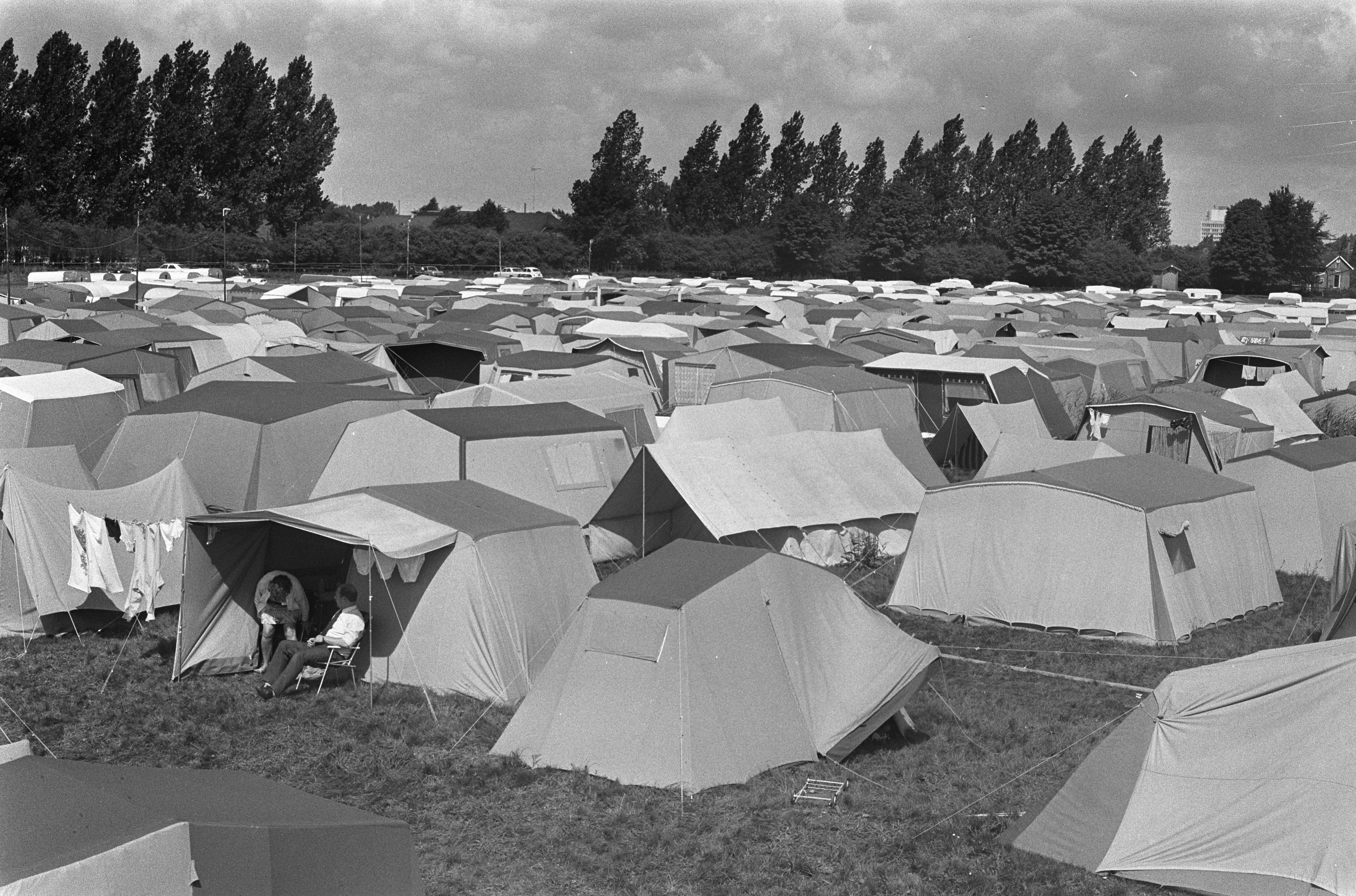 Collectie / Archief : Fotocollectie Anefo Reportage / Serie : [ onbekend ] Beschrijving : Jehovacongres te Utrecht, tentenkamp van de Jehovas Datum : 8 augustus 1973 Locatie : Utrecht Trefwoorden : tentenkampen Fotograaf : Peters, Hans / Anefo Auteursrechthebbende : Nationaal Archief Materiaalsoort : Negatief (zwart/wit) Nummer archiefinventaris : bekijk toegang 2.24.01.05 Bestanddeelnummer : 926-5975